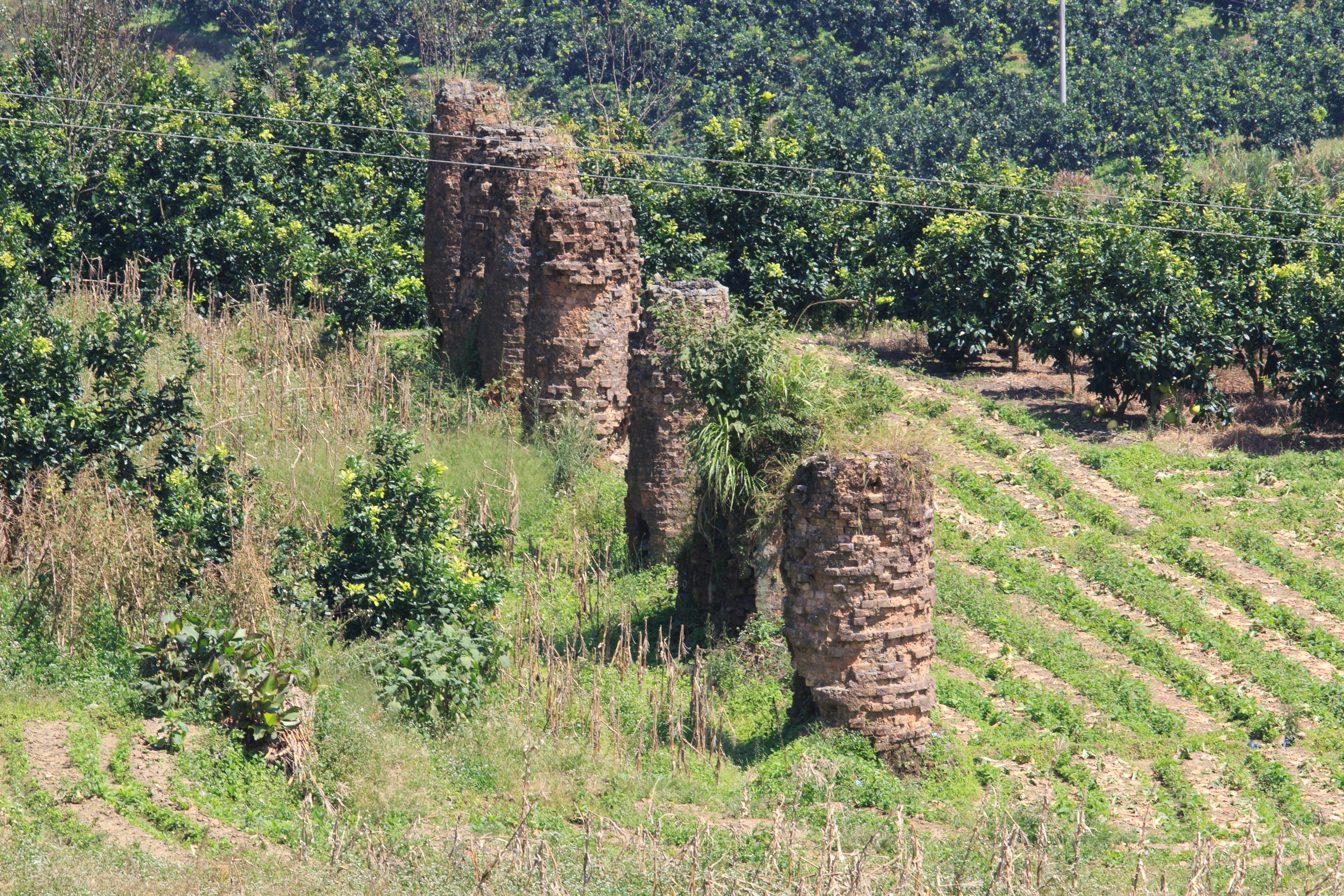 福建省南靖县书洋镇五更寮村土高炉群